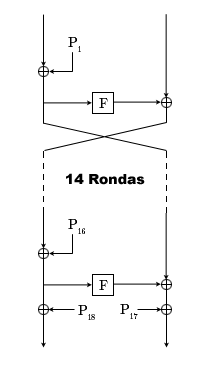 Diagrama sencillo del algoritmo de cifrado Blowfish